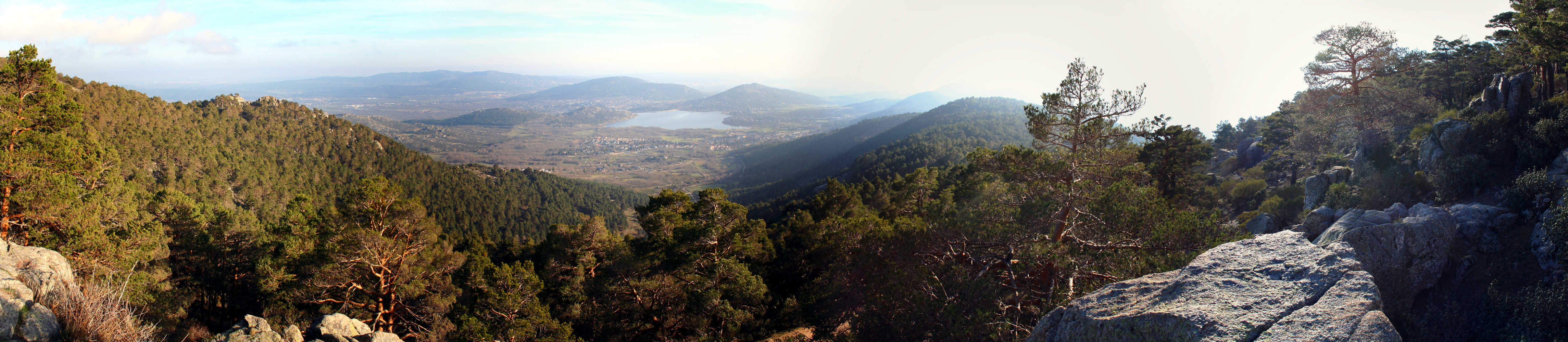 Vistas desde el Parque Regional de la Cuenca Alta del Manzanares, Madrid, España.